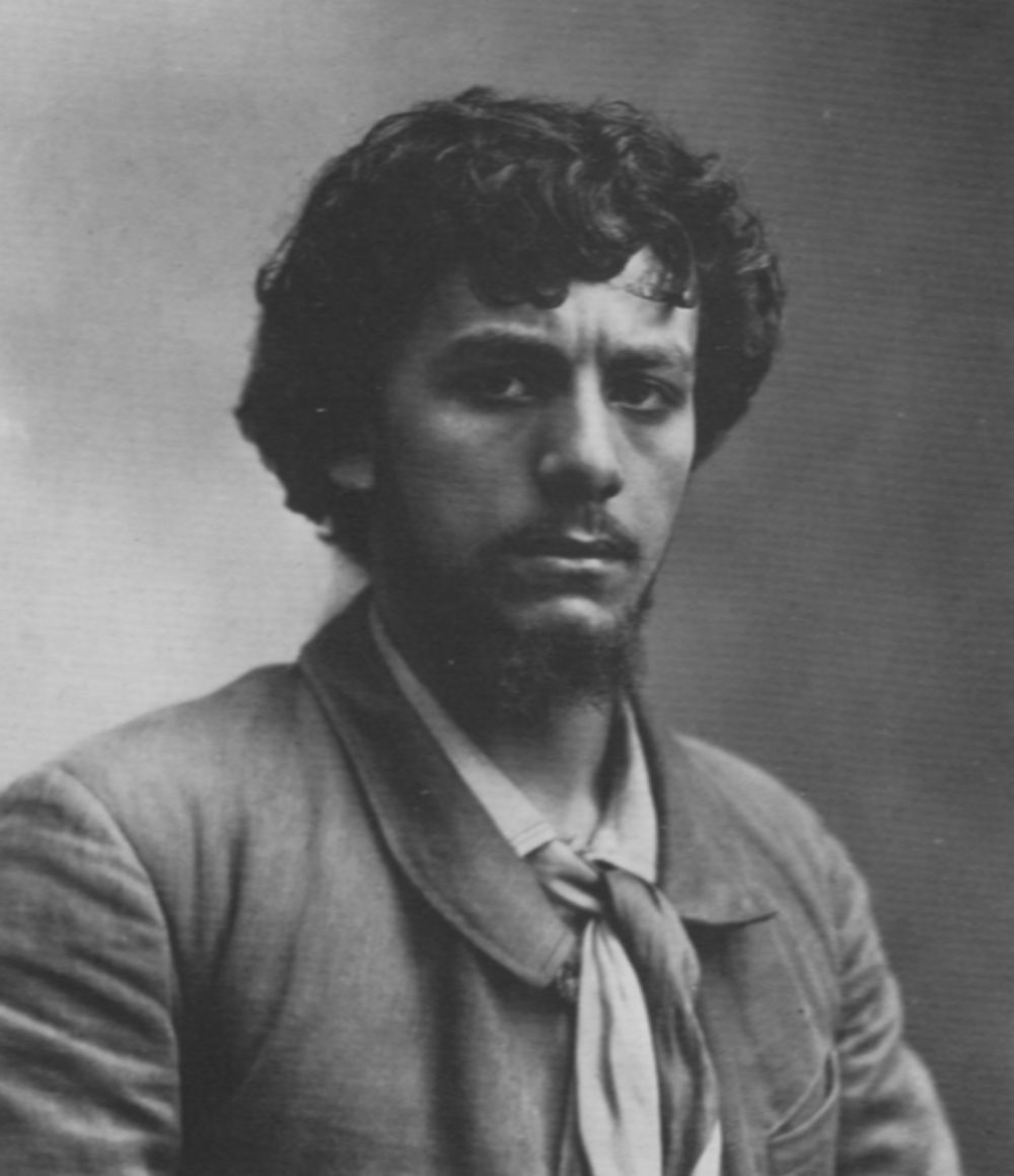 Atelier Nadar: Albert Lambert (1865-1941), Schauspieler